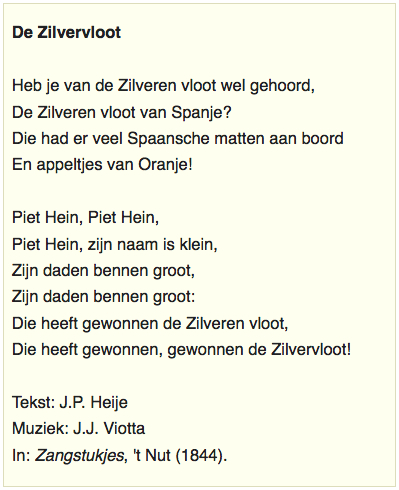 J.P. Heije (1809-1876) en J.J. Viotta (1814-1859), tekst liedje 'Heb je van de Zilveren vloot wel gehoord' (1844). Zilvervloot. Opgenomen in het liedboek "Kun je nog zingen, zing dan mee" (1906).